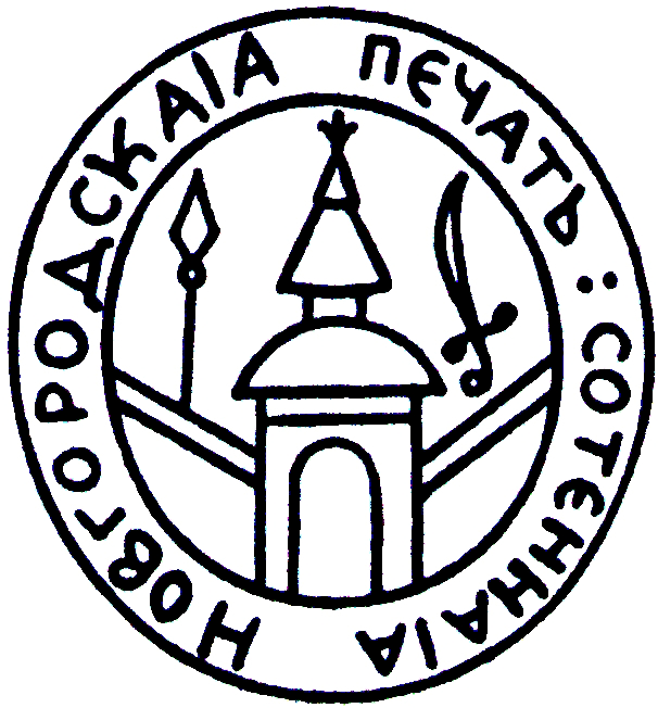 Печатка Новгород-Сіверської сотні 1739-1762 років.